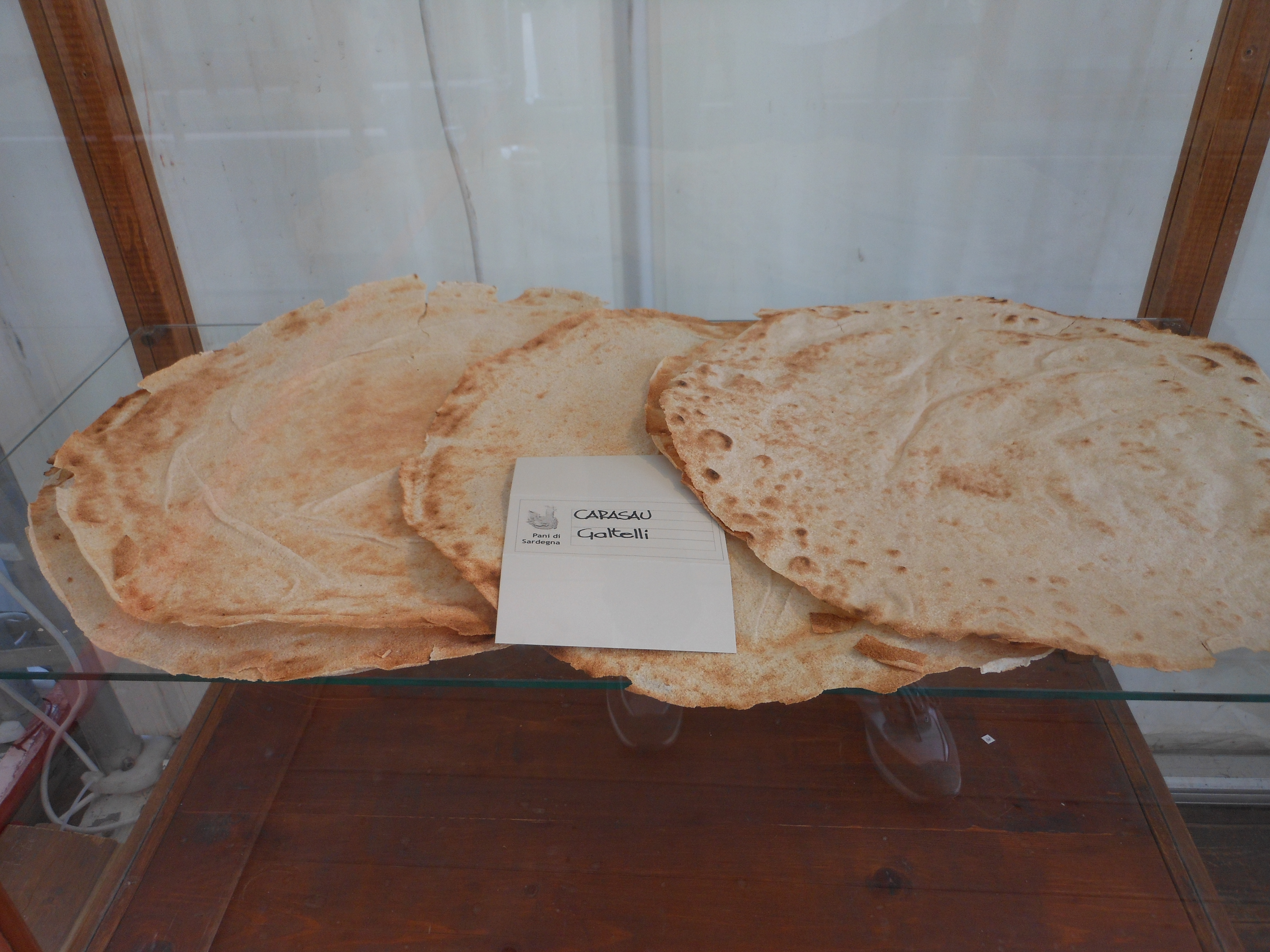 Pane tradizionale